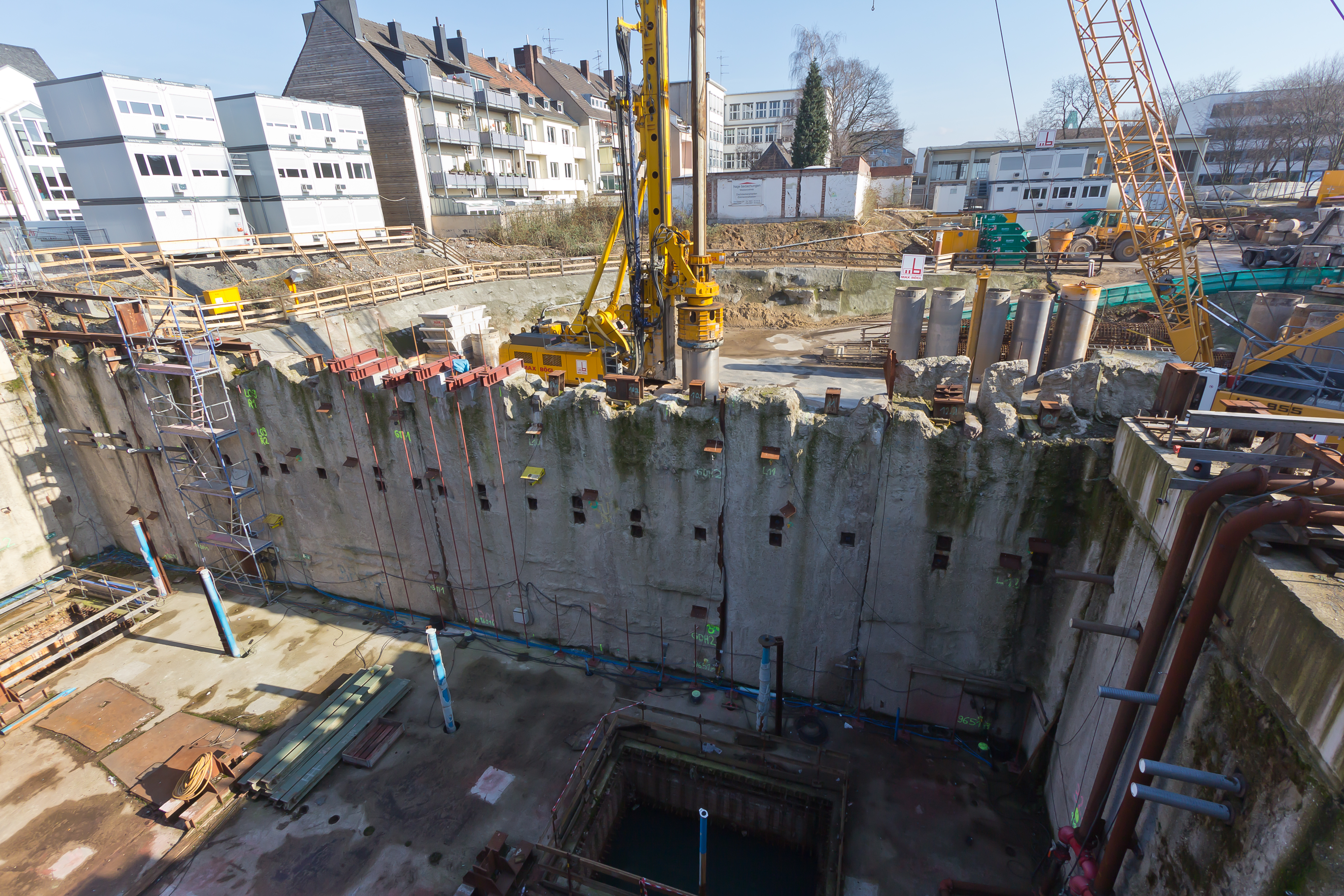 Bau des Besichtigungsbauwerks zur Erforschung der Einsturzursache des Historischen Archivs der Stadt Köln am 3. März 2009 Foto: Vordergrund: Baugrube des Gleiswechselbauwerks, in die das Archivgebäude stürzte. Hintergrund: Ein Bohrpfahlgerät beim Errichten des Besichtigungsbauwerks. In der Mitte ist die vermutlich schadhafte Schlitzwand zu sehen.